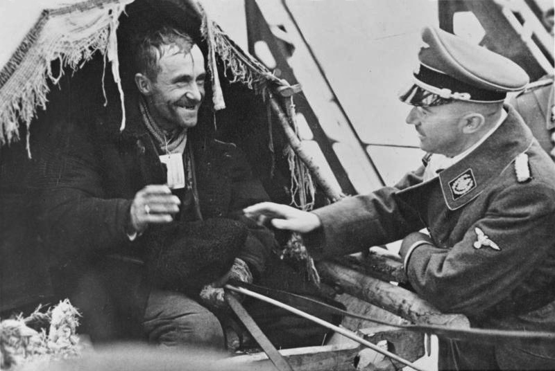 Przemysl, Galiziendeutsche Rückwanderer: der letzte Treck auf der Sanbrücke Abgebildete Personen: Himmler, Heinrich: Reichsführer der SS, Deutschland (GND 11855123X)